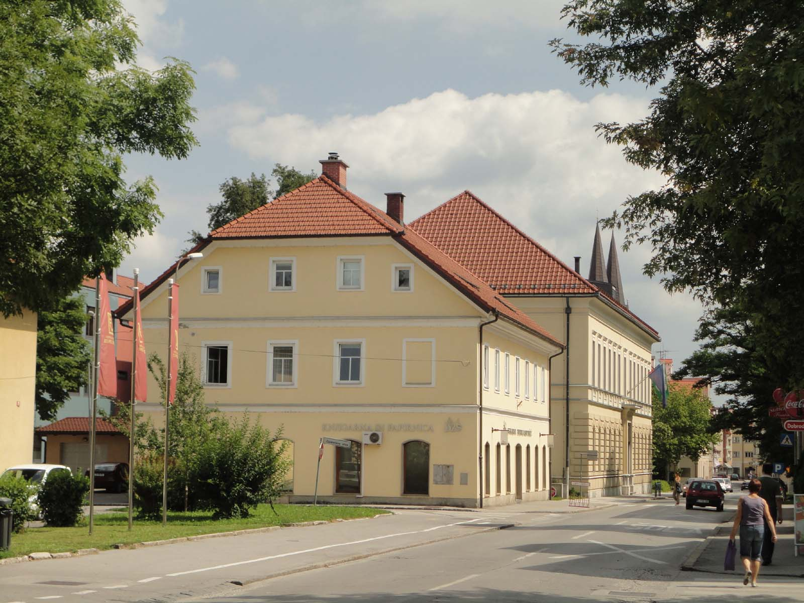 Gimnazija Kočevje, v ozadju zvonika cerkve sv. Jerneja